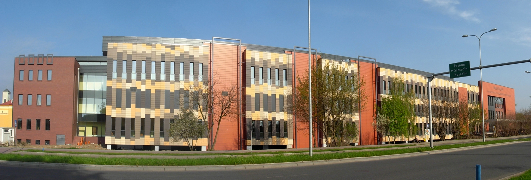 Budynek biblioteki uniwersyteckiej przy ul. Ogińskiego w Bydgoszczy, należący do Uniwersytetu Kazimierza Wielkiego